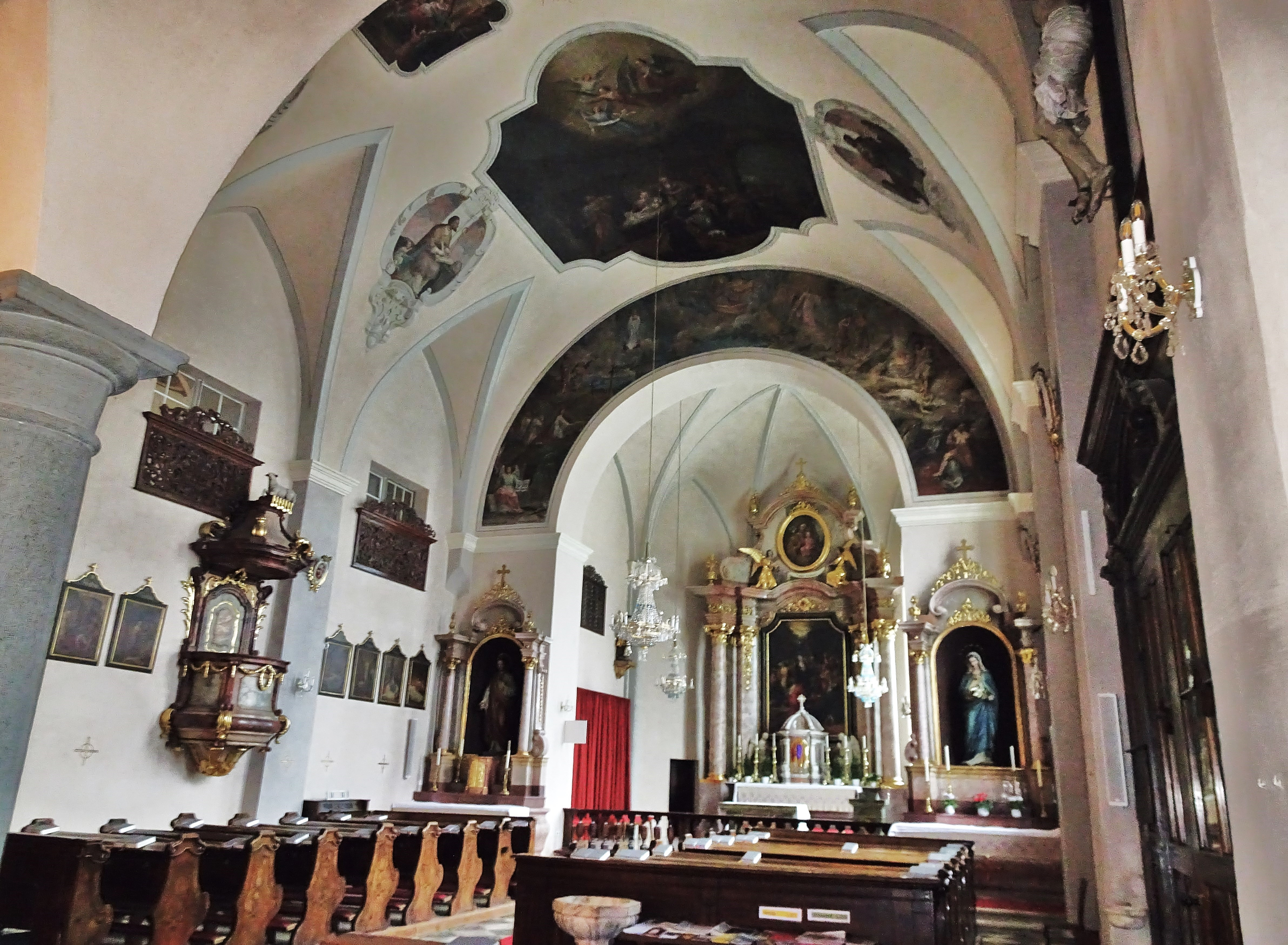 Heiligengeistkirche (Klagenfurt am Wörthersee), Innenansicht